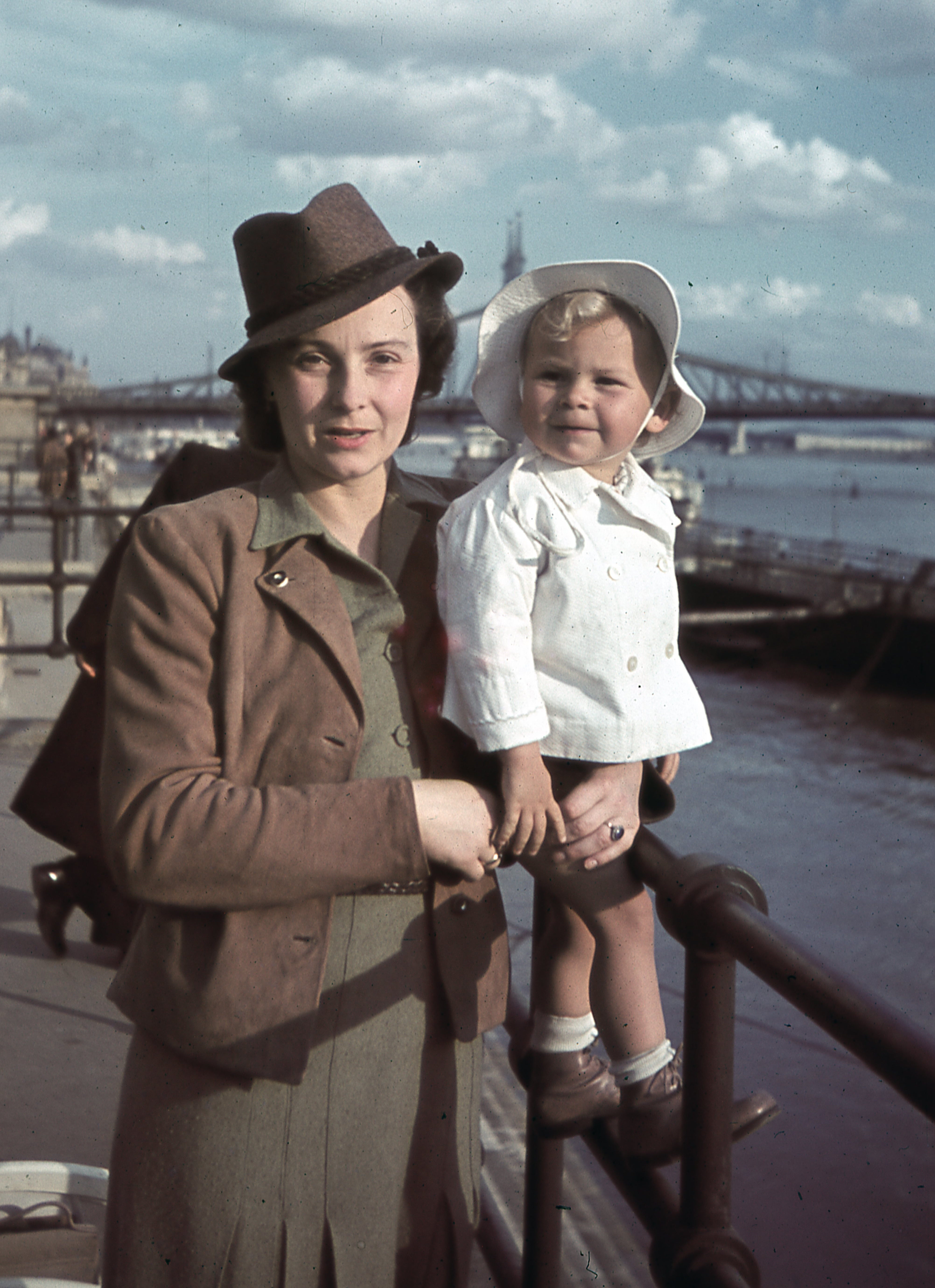 Belgrád (Ferenc József) rakpart, háttérben a Szabadság (Ferenc József) híd. Location: Hungary, Budapest V. Tags: colorful, Budapest Title: Belgrád (Ferenc József) rakpart, háttérben a Szabadság (Ferenc József) híd.